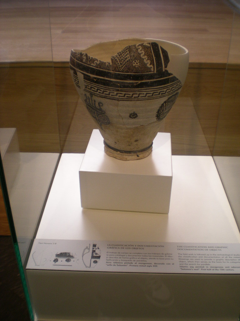 Jarra andalusí pintada al manganeso. Museo del Teatro Romano de Cartagena.